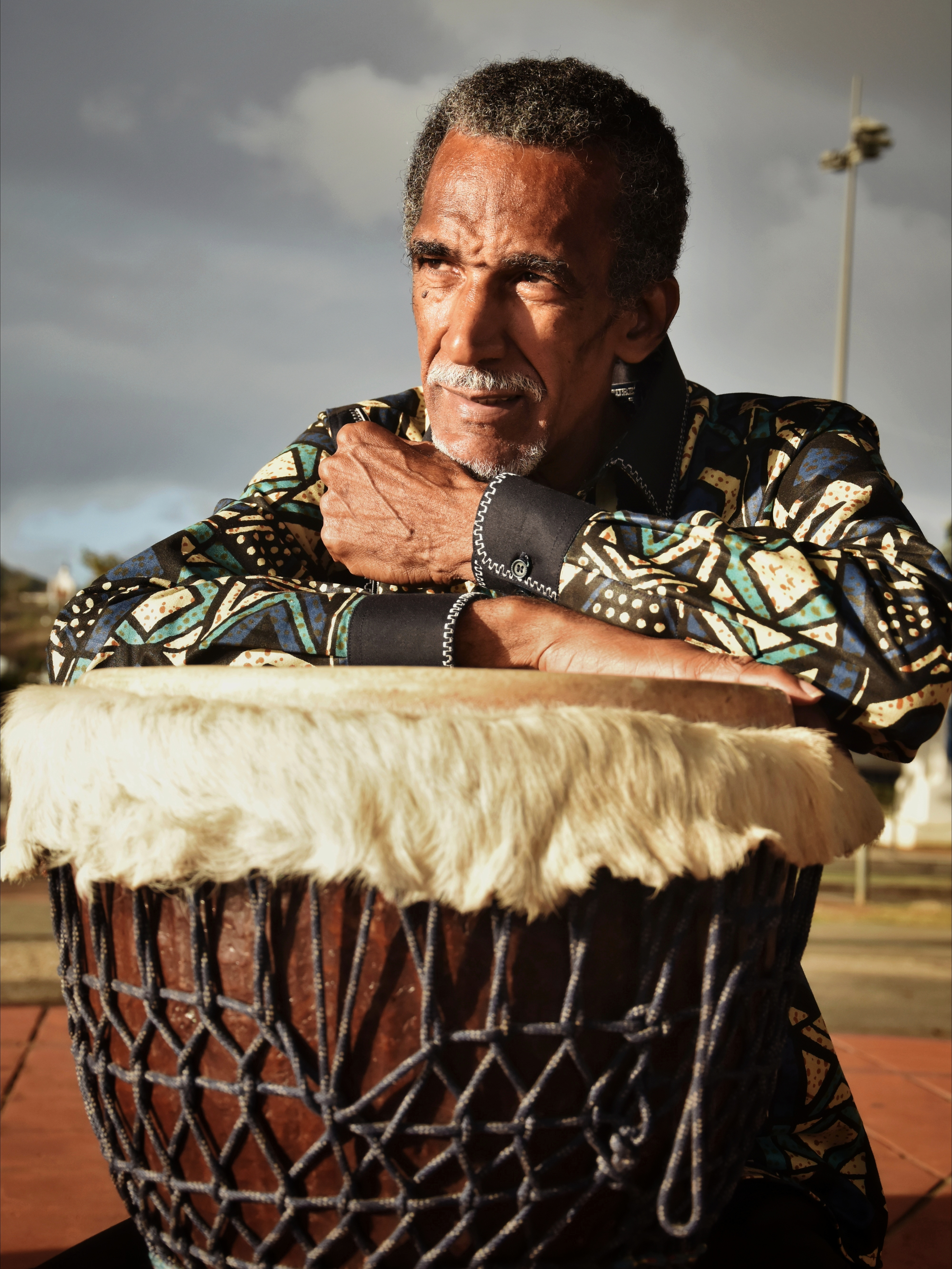 Portrait Alfred Varasse